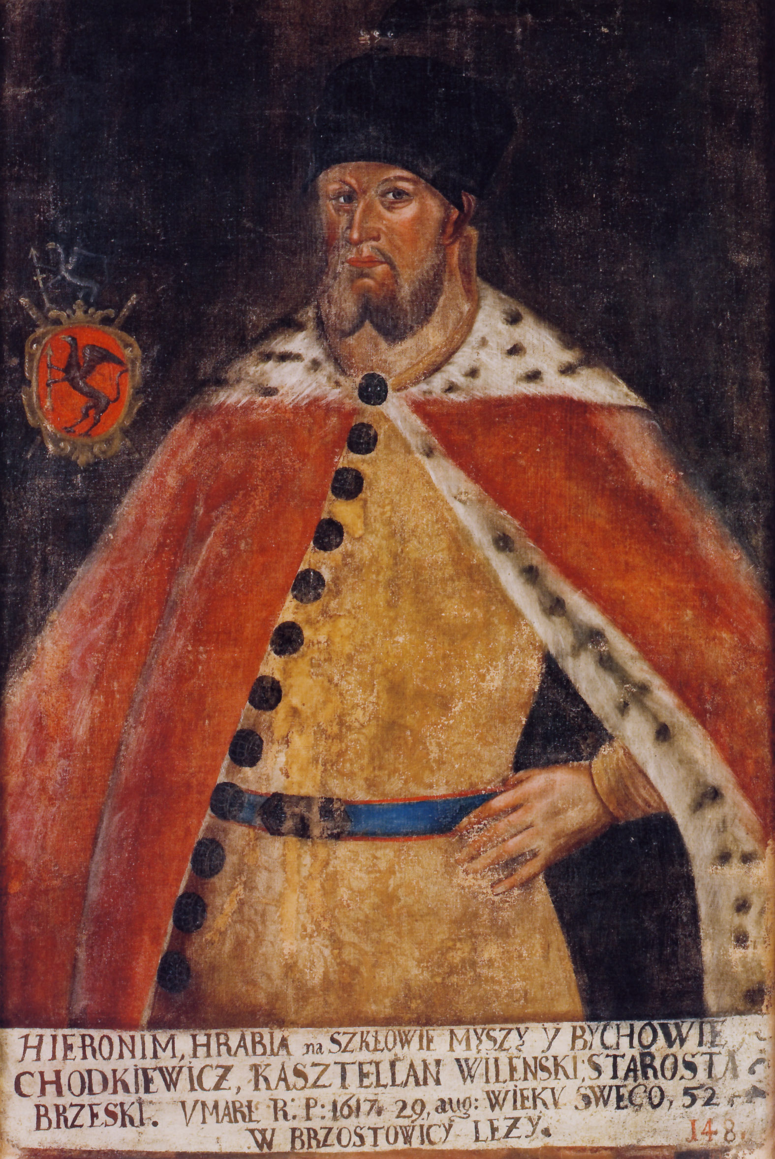 Беларуская (тарашкевіца): Партрэт Гераніма Хадкевіча (Hieranim Chadkievič)